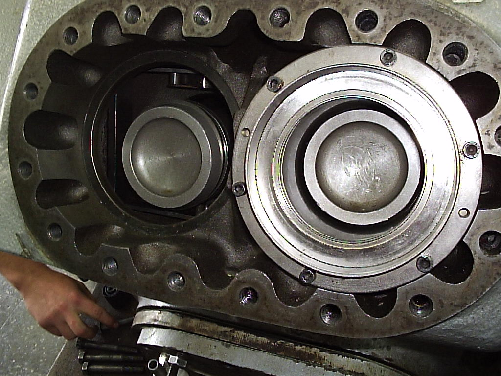 pistón de compresor Sabroe para amoníaco (R717)